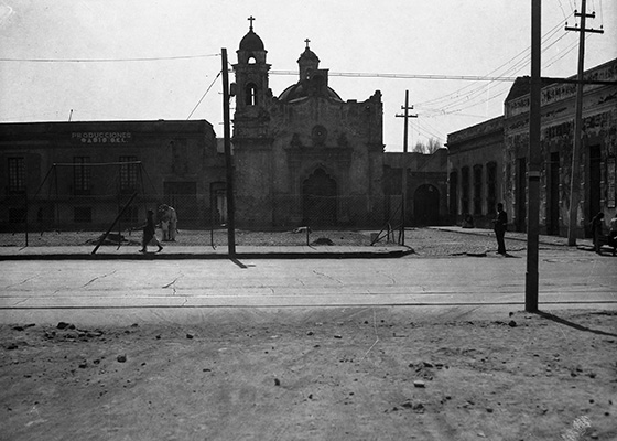 Fotografía antigua de la Ciudad de México resguardadas por el Museo Archivo de la Fotografía (MAF) de la Ciudad de México.